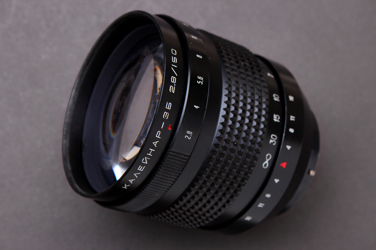 Объектив "Калейнар-3Б" 2,8/150